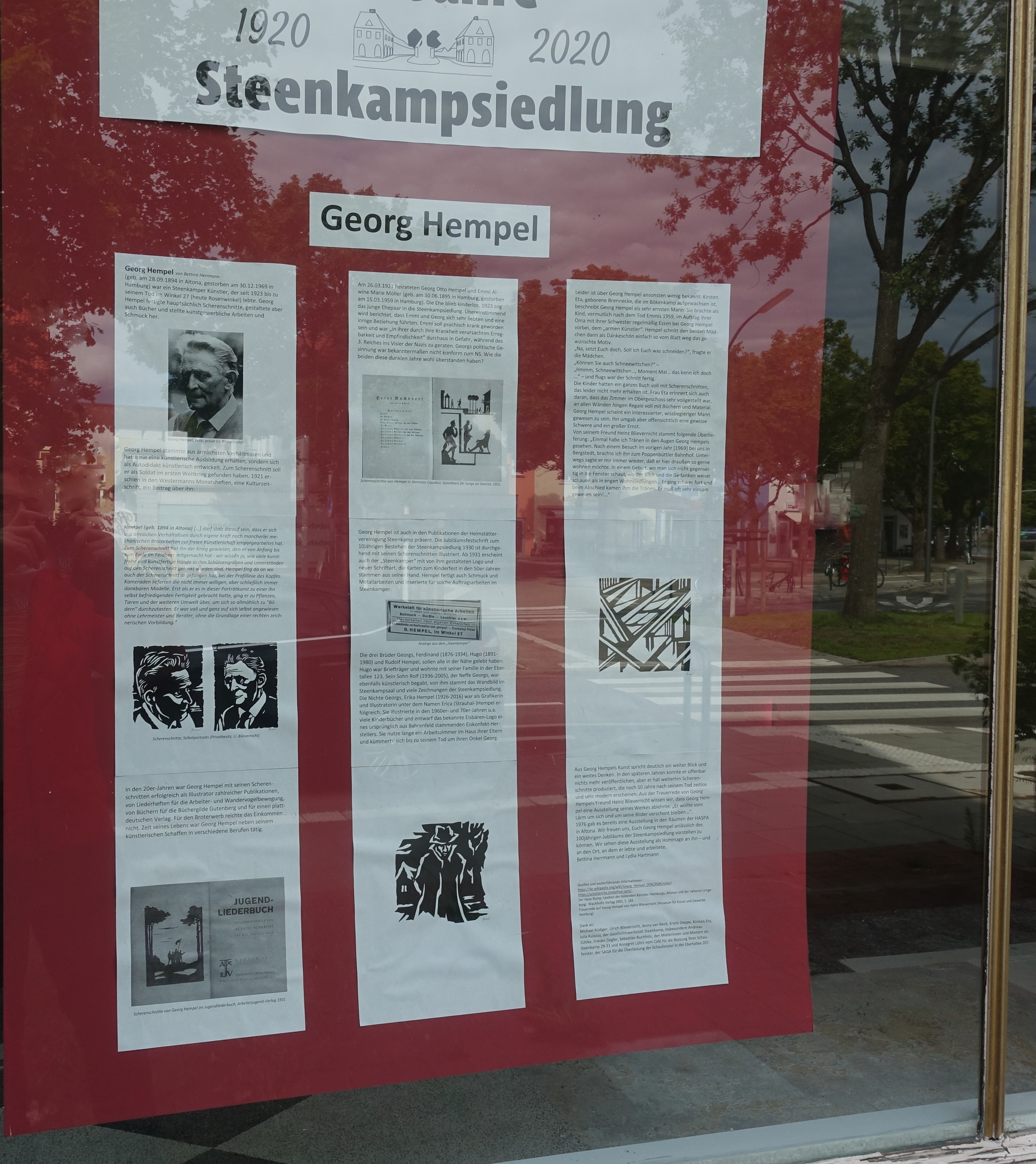 Ausstellung zu Georg Hempel 100 Jahre Steenkampsiedlung